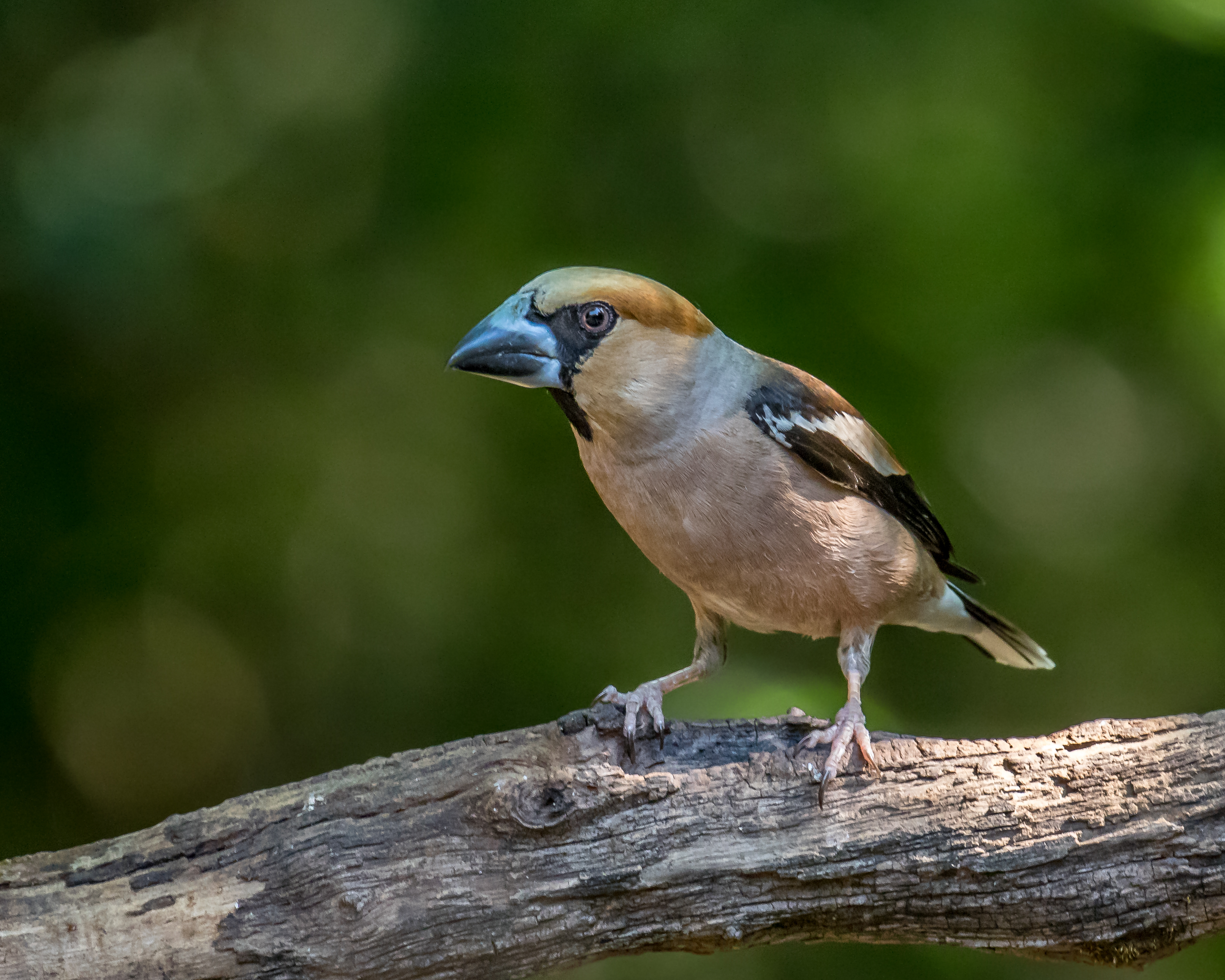 Taken in Hungary.